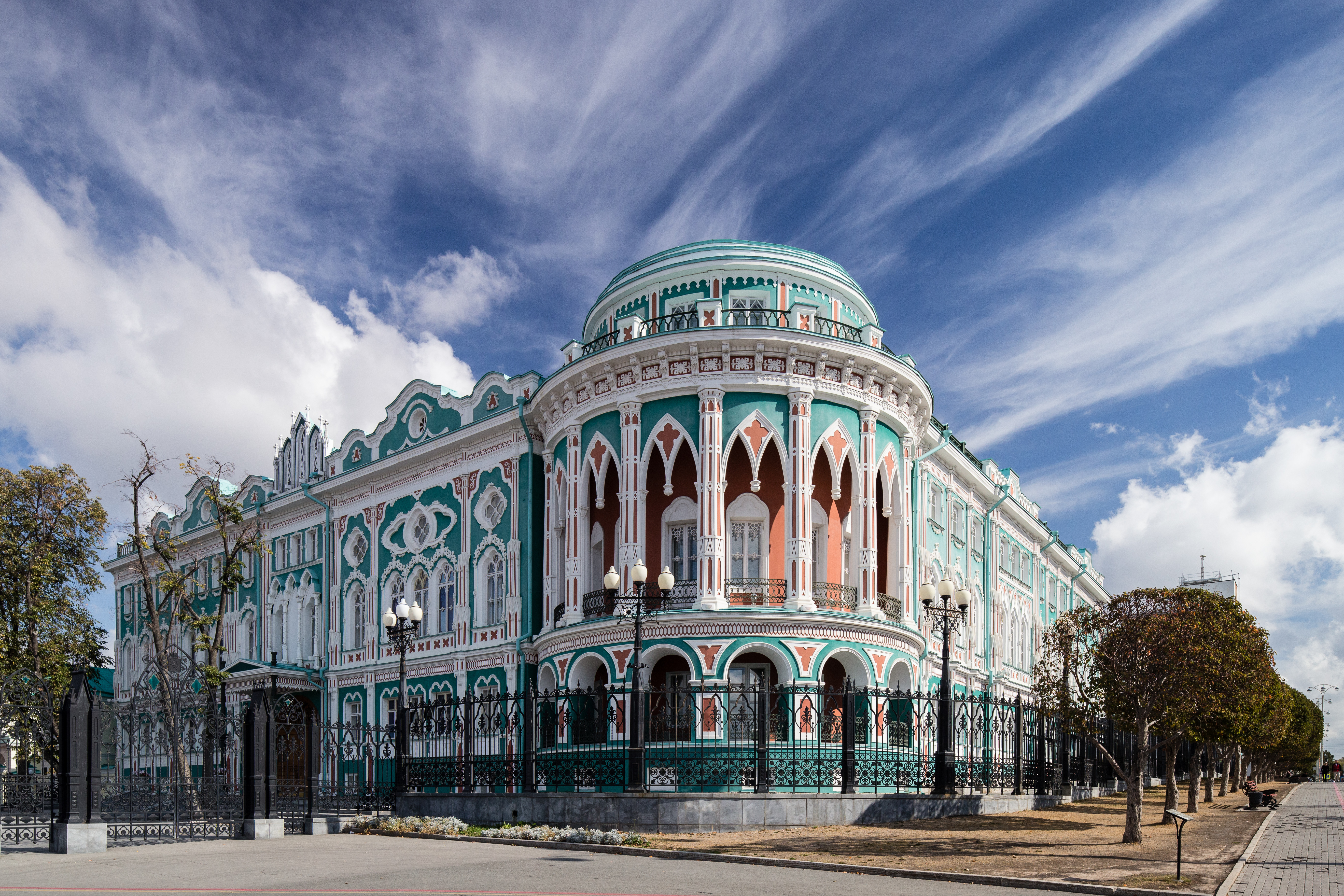 Дом Севастьянова (окружной суд): проспект Ленина, 35, Екатеринбург, Свердловская область